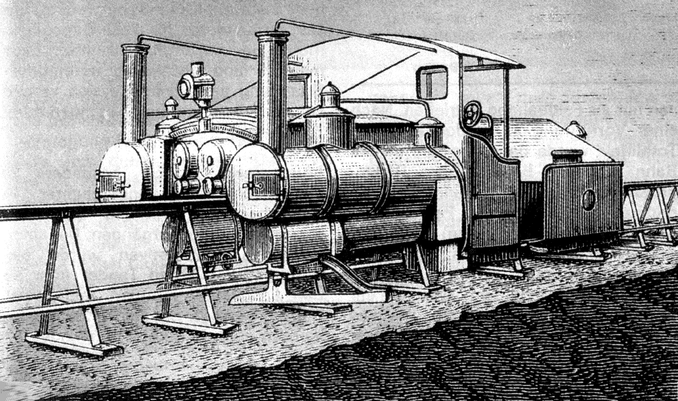 Lartigue Eisenbahn, Schnittbild